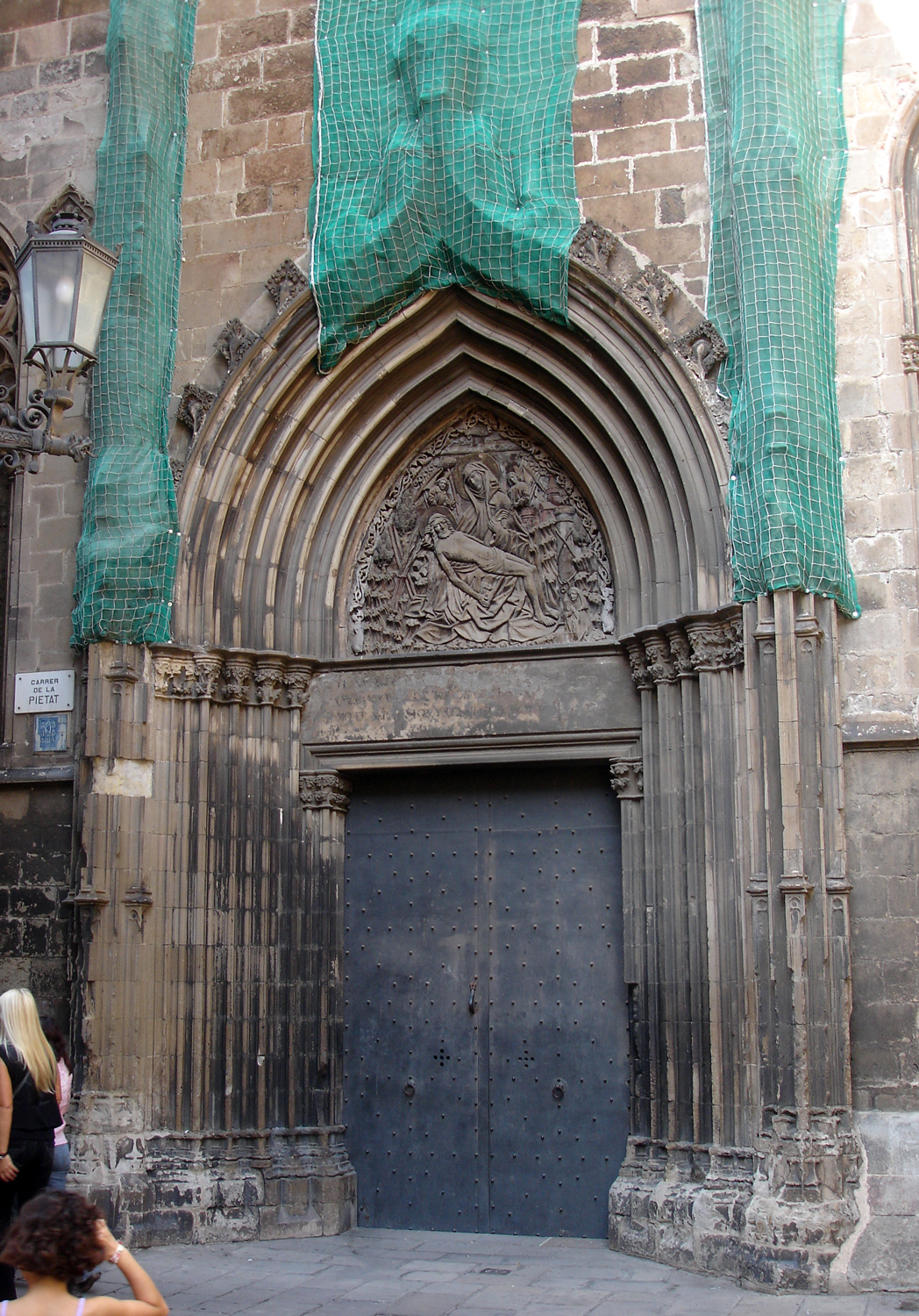 Catedral de Barcelona - Porta de la Pietat